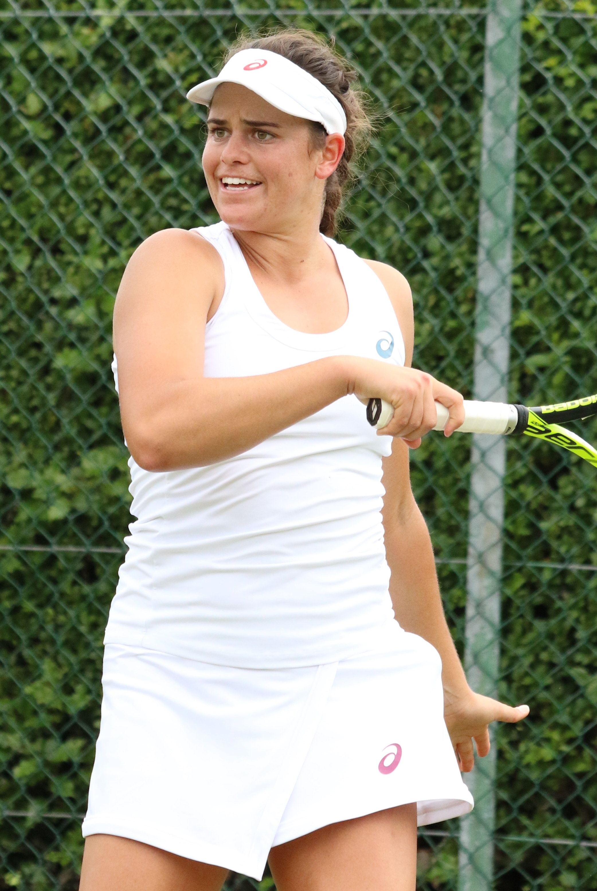 Brady WMQ16 (3)